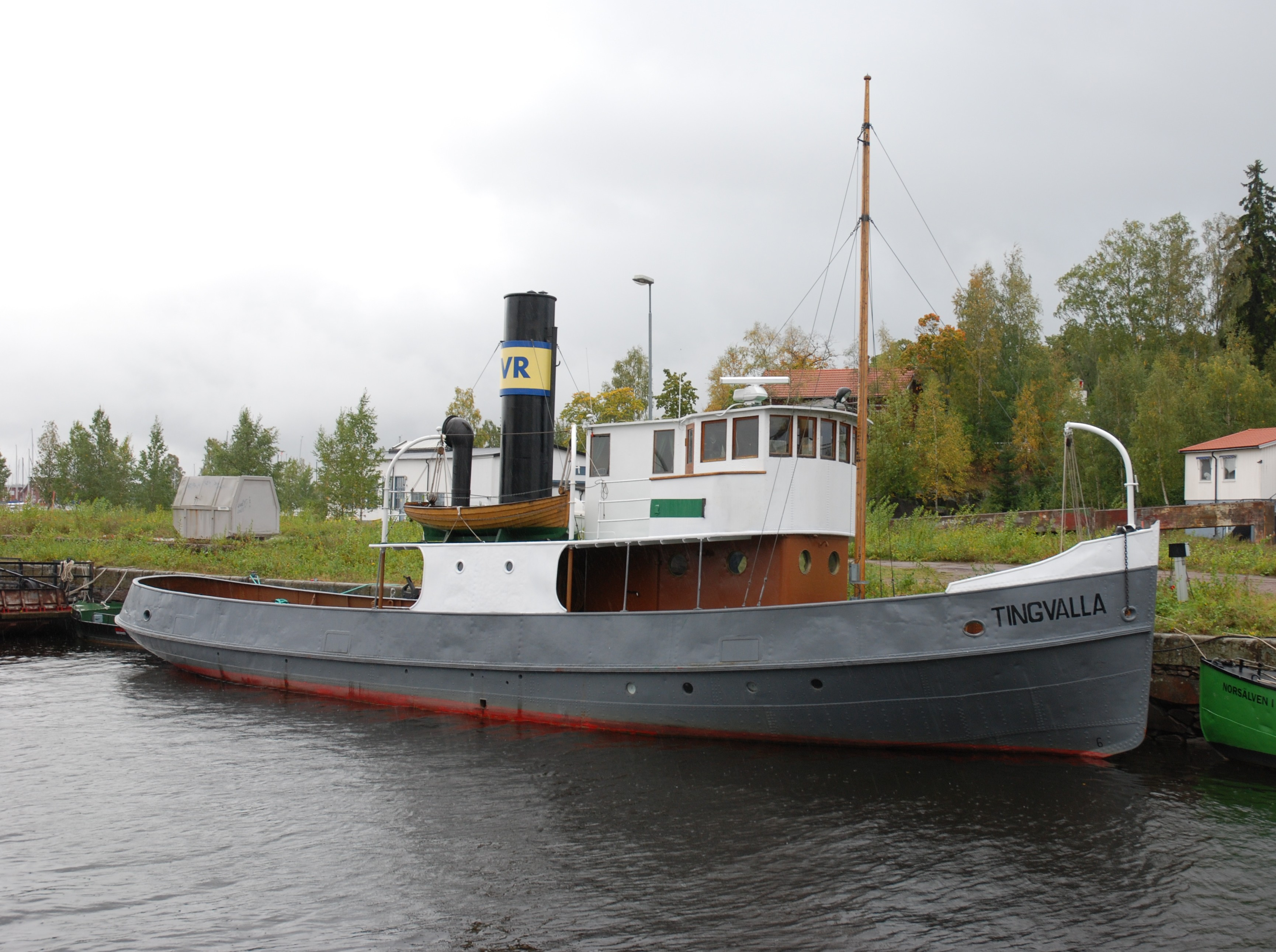 S/S Tingvalla i Karlstad This is an image of a protected Swedish ship, with call sign SFRH .